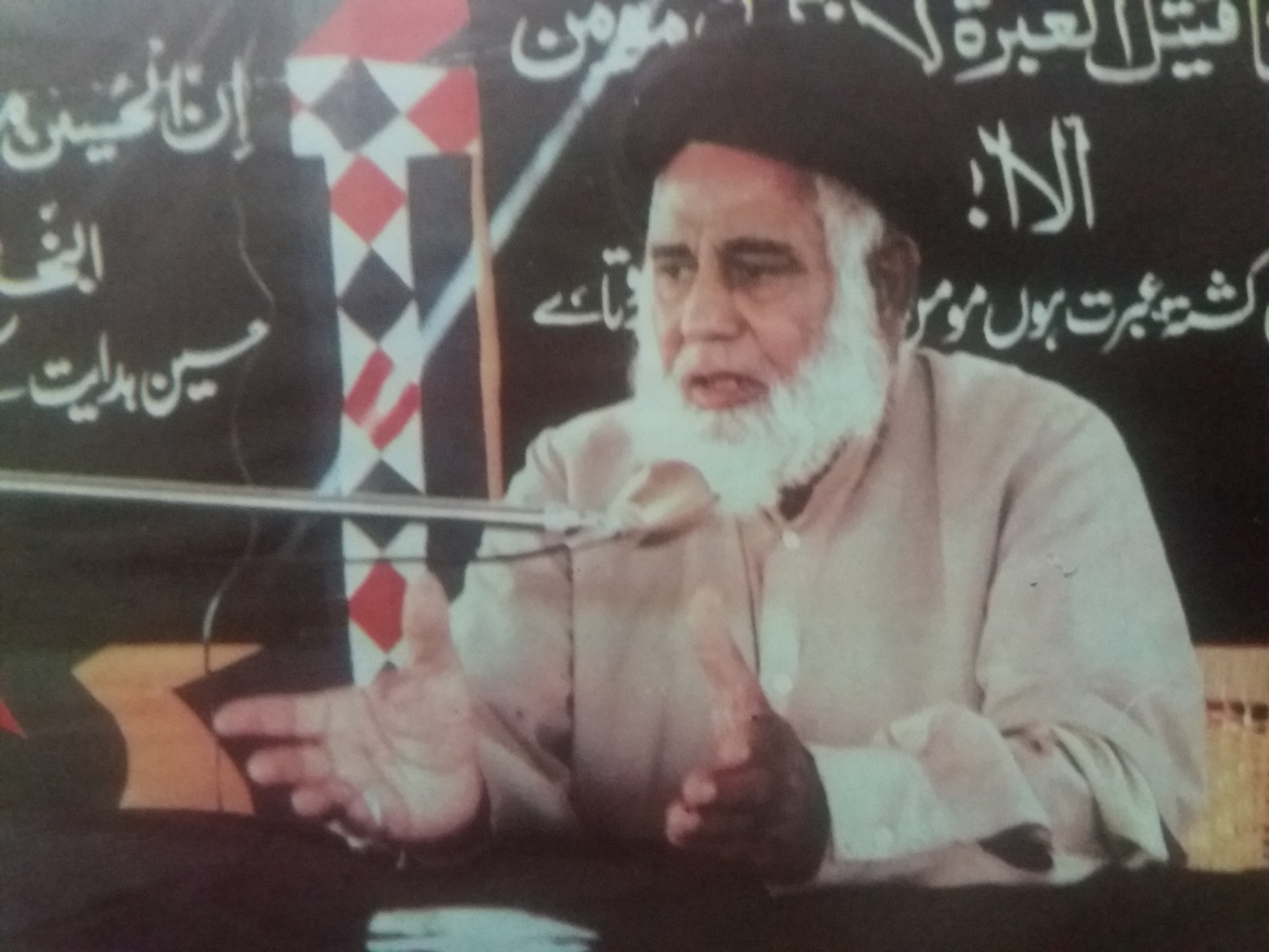 عشرہ محرم الحرام ۔ شاہ گردیز ملتان